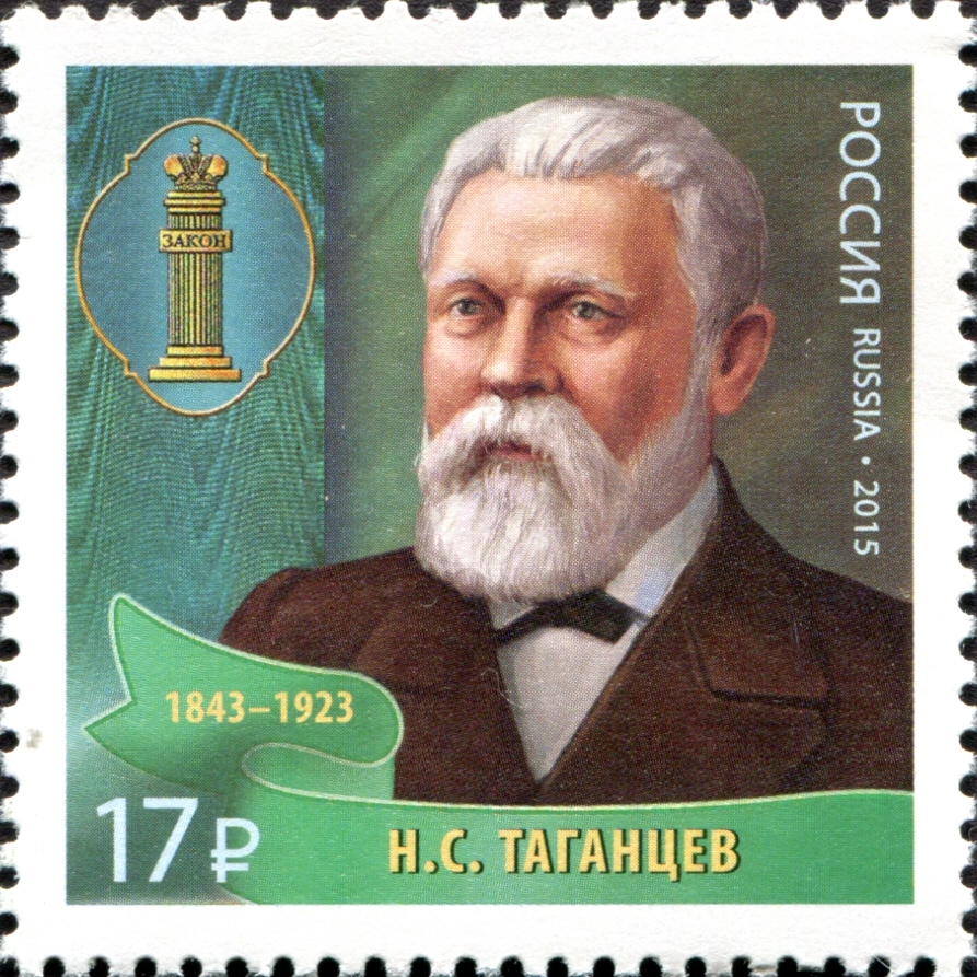 Выдающиеся юристы России.Таганцев (1843–1923)